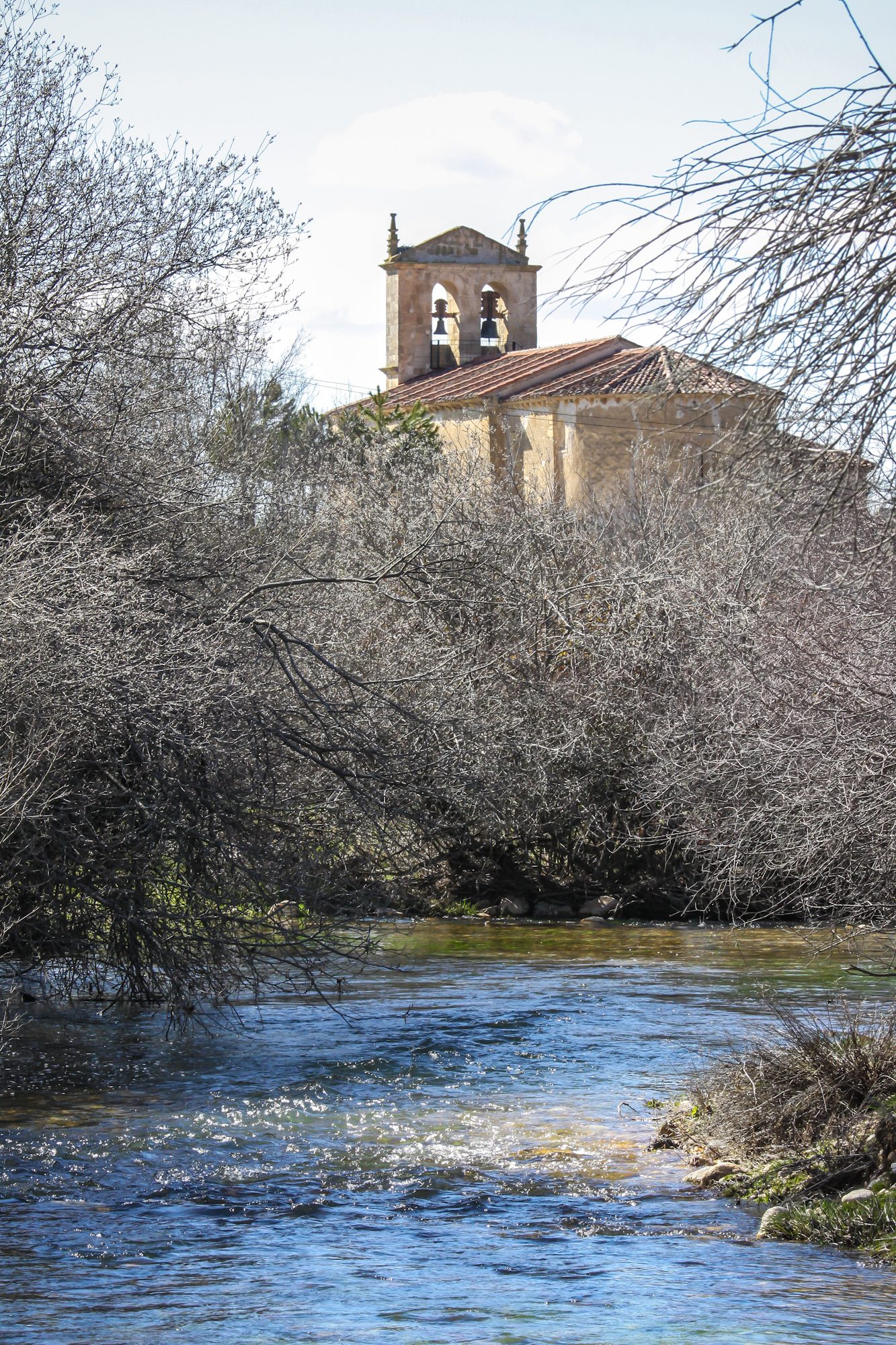 sss